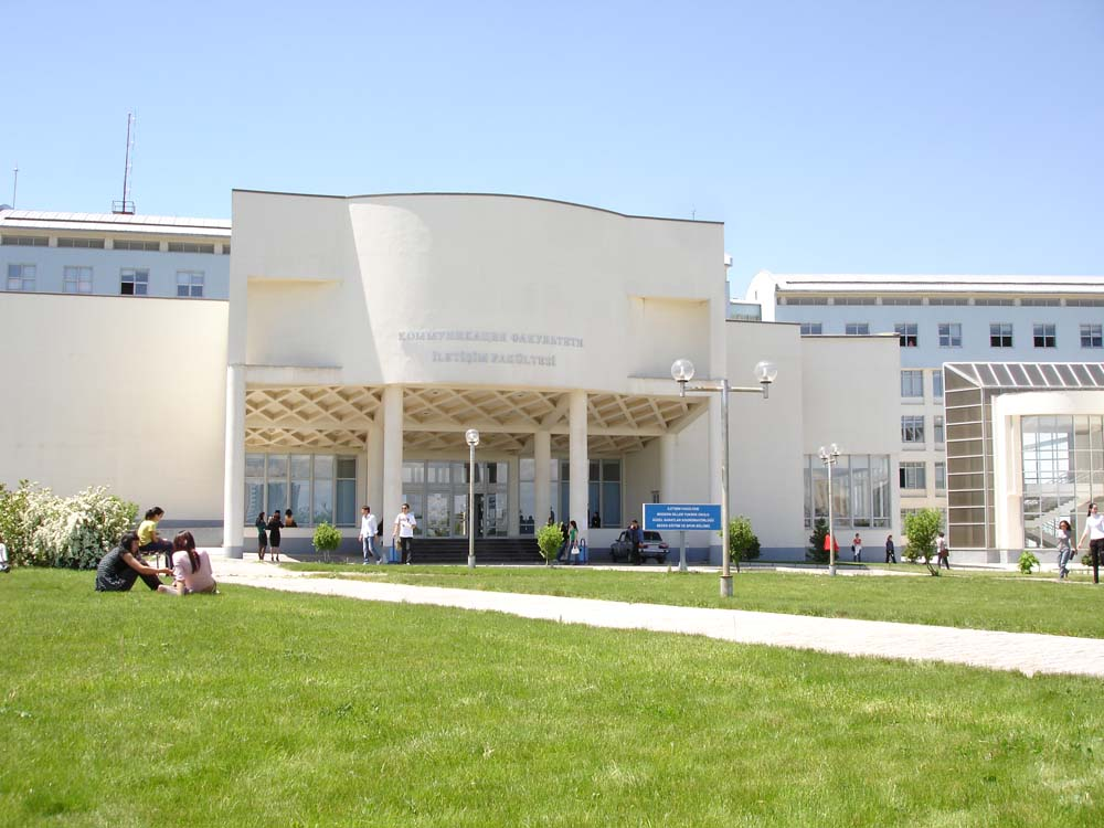 Универмитет Манас